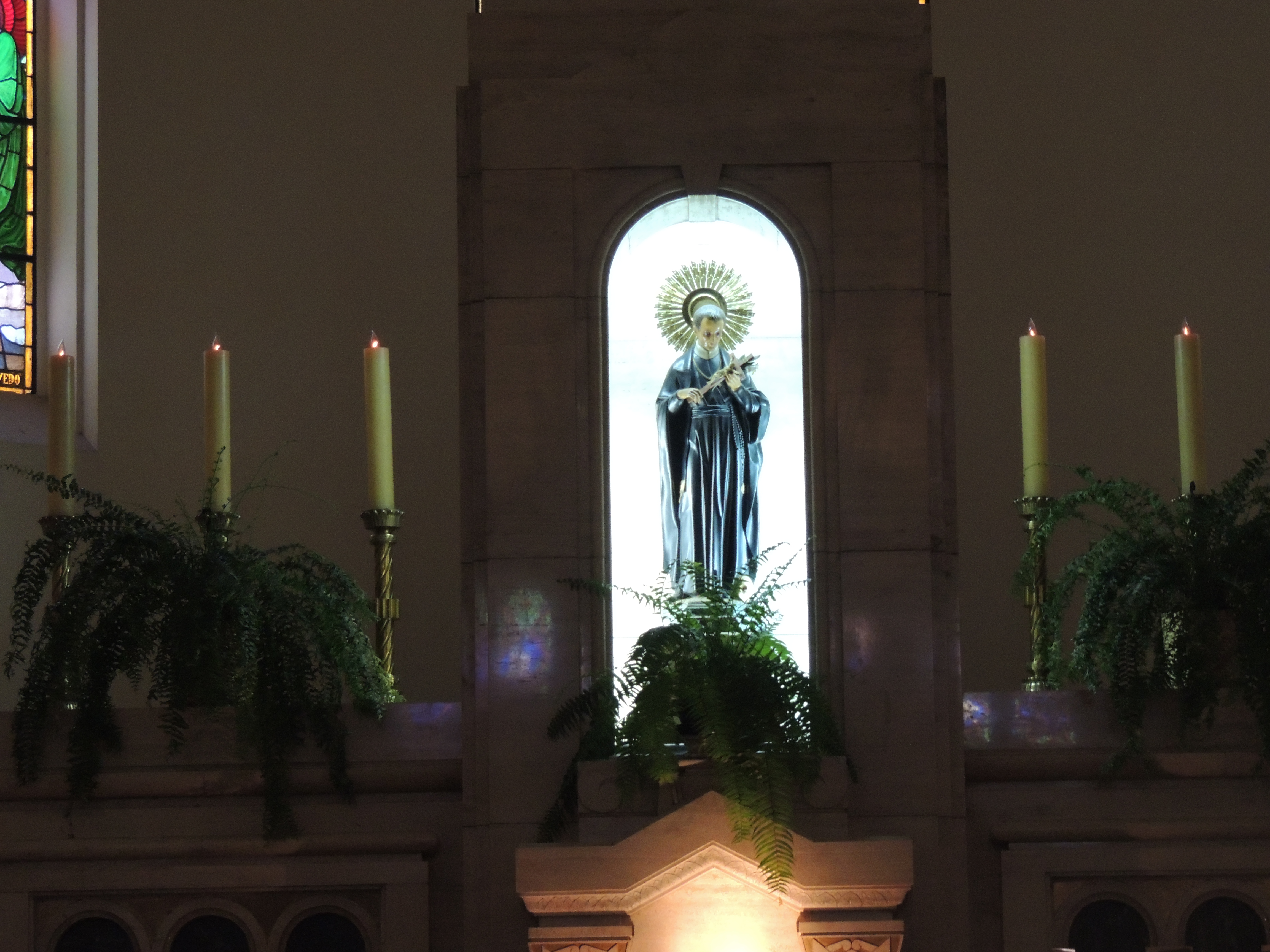 Padroeiro da Paróquia de São Geraldo das Perdizes, em Perdizes, São Paulo, SP, Brasil.